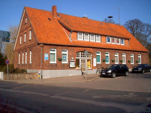 Altes Rathaus Dorfmark, Markststraße 1. Beherbergt heute: Außenstelle der Bücherei und Stadtverwaltung der Stadt Bad Fallingbostel, Tourist-Information der Dorfmark Touristik e.V., Wohnungen im Obergeschoss.